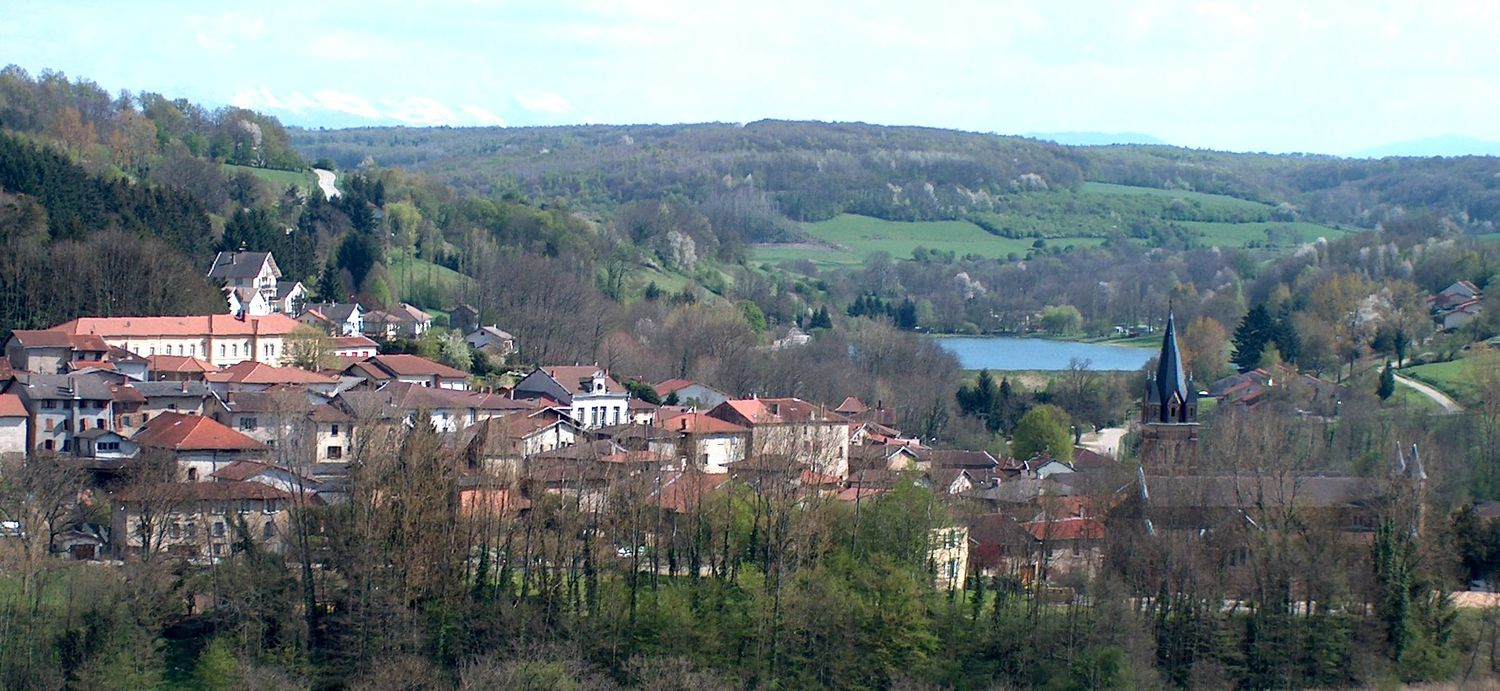 Le Village de Roybon vu du nord vers le sud. Au fond, on distingue le Vercors.